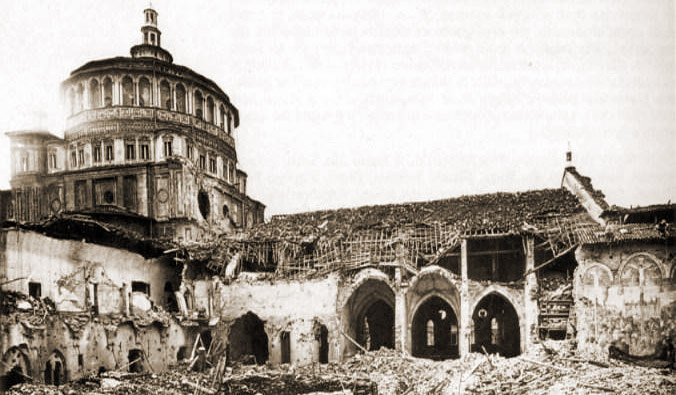 Il chiostro dei morti, il refettorio e il fianco destro della chiesa dopo il bombardamento